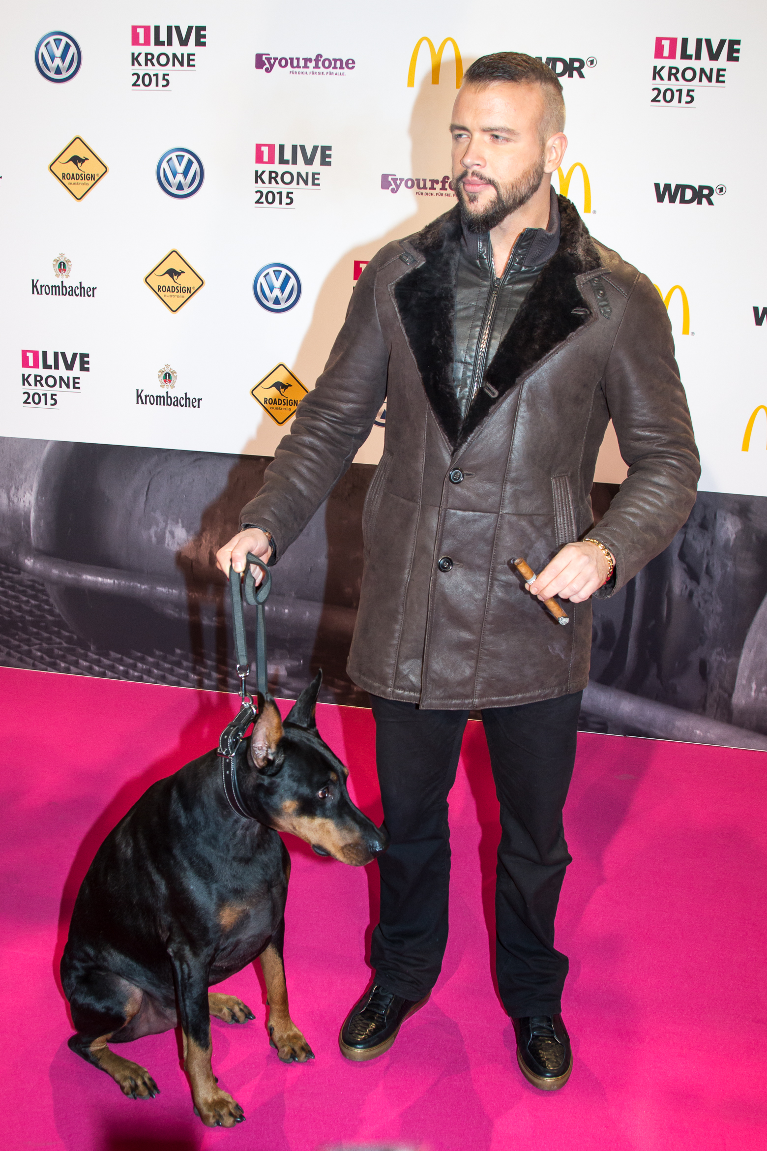 1LIVE Krone 2015 - Kollegah